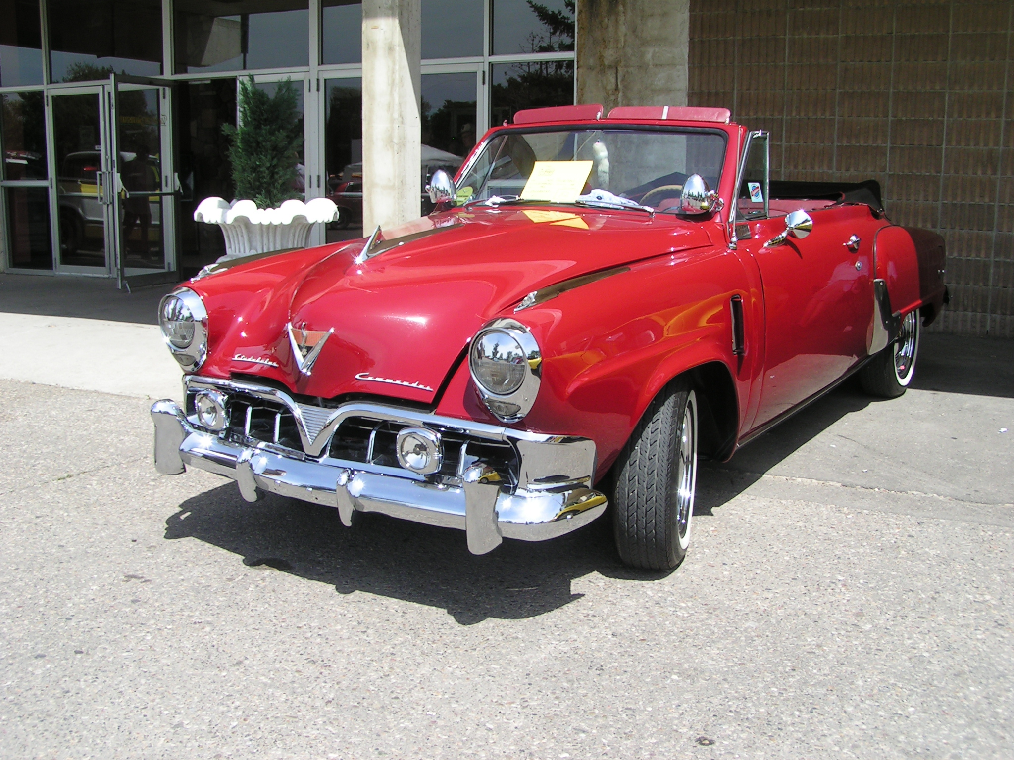 1952 Studerbaker Commander State